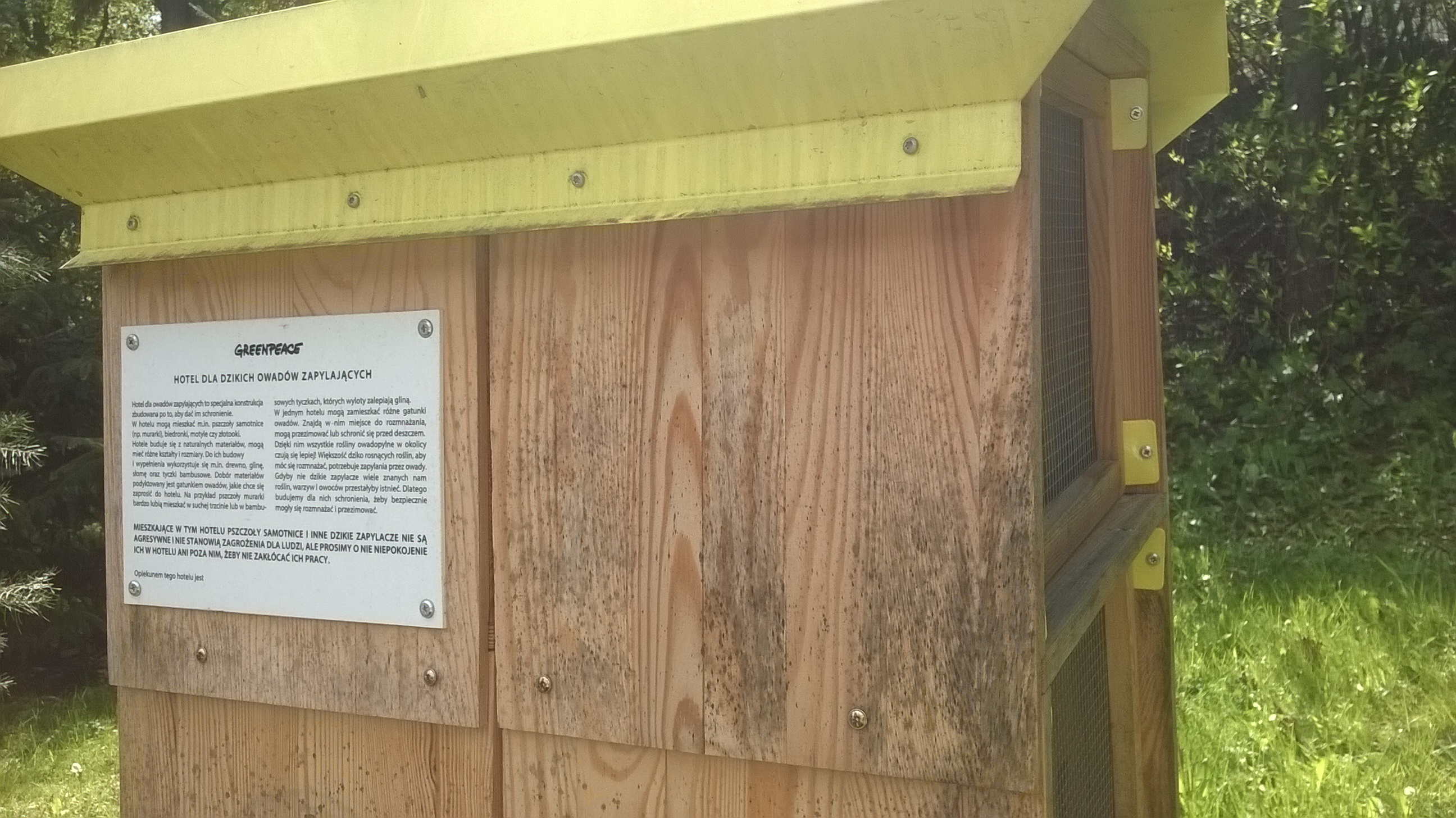 Hotel dla pszczół, ustawiony w Ogrodzie Różanym w Szczecinie (kwiecień 2015)